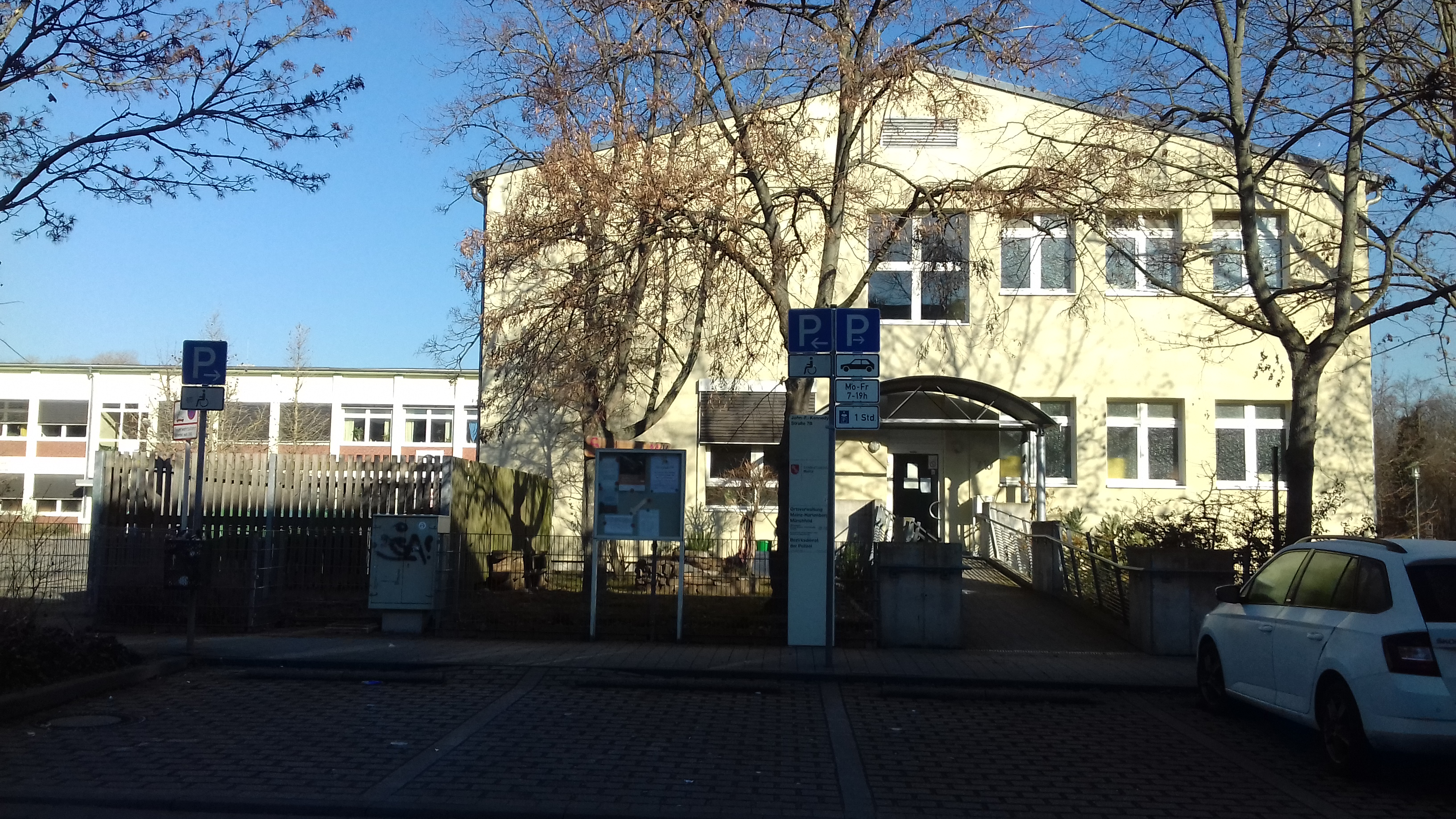 Blick auf die Ortsverwaltung auf dem Hartenberg in Mainz